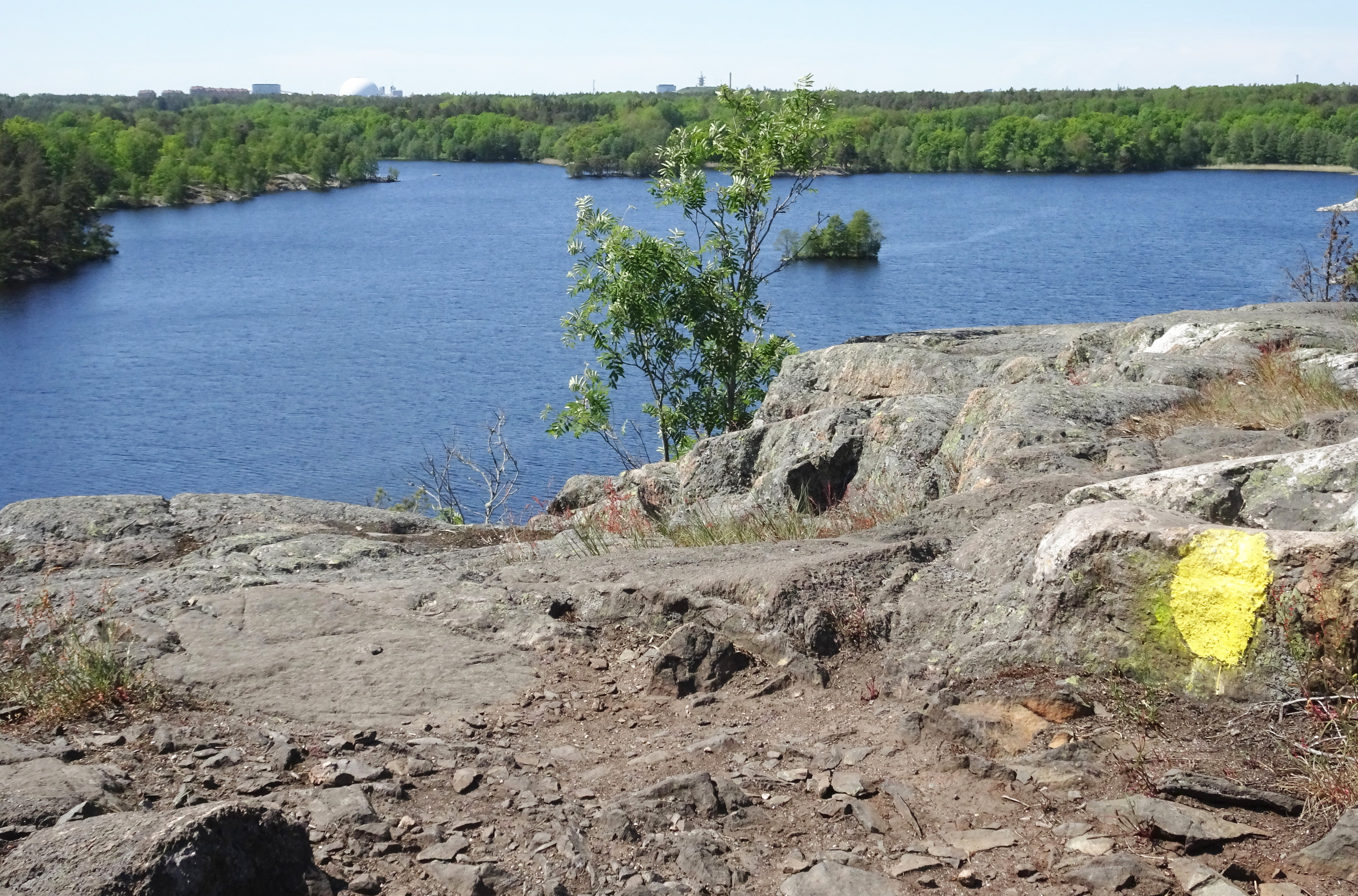 "Källtorpssjön runt", gula slingan runt Källtorpssjön, längd 5 km